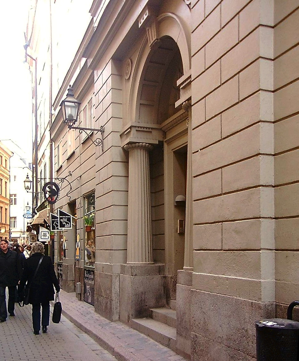 House of Palmstedt at 27, Västerlånggatan, Gamla stan, Stockholm